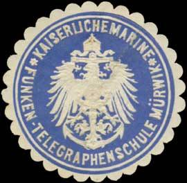 Sealing stamp Title: K. Marine Telegraphenschule Mürwik Description: Telegrafie Place: Mürwik size: 4 cm